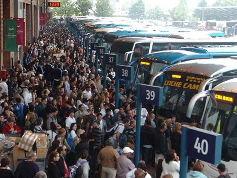 Terminal de Tres cruces en Montevideo, Uruguay